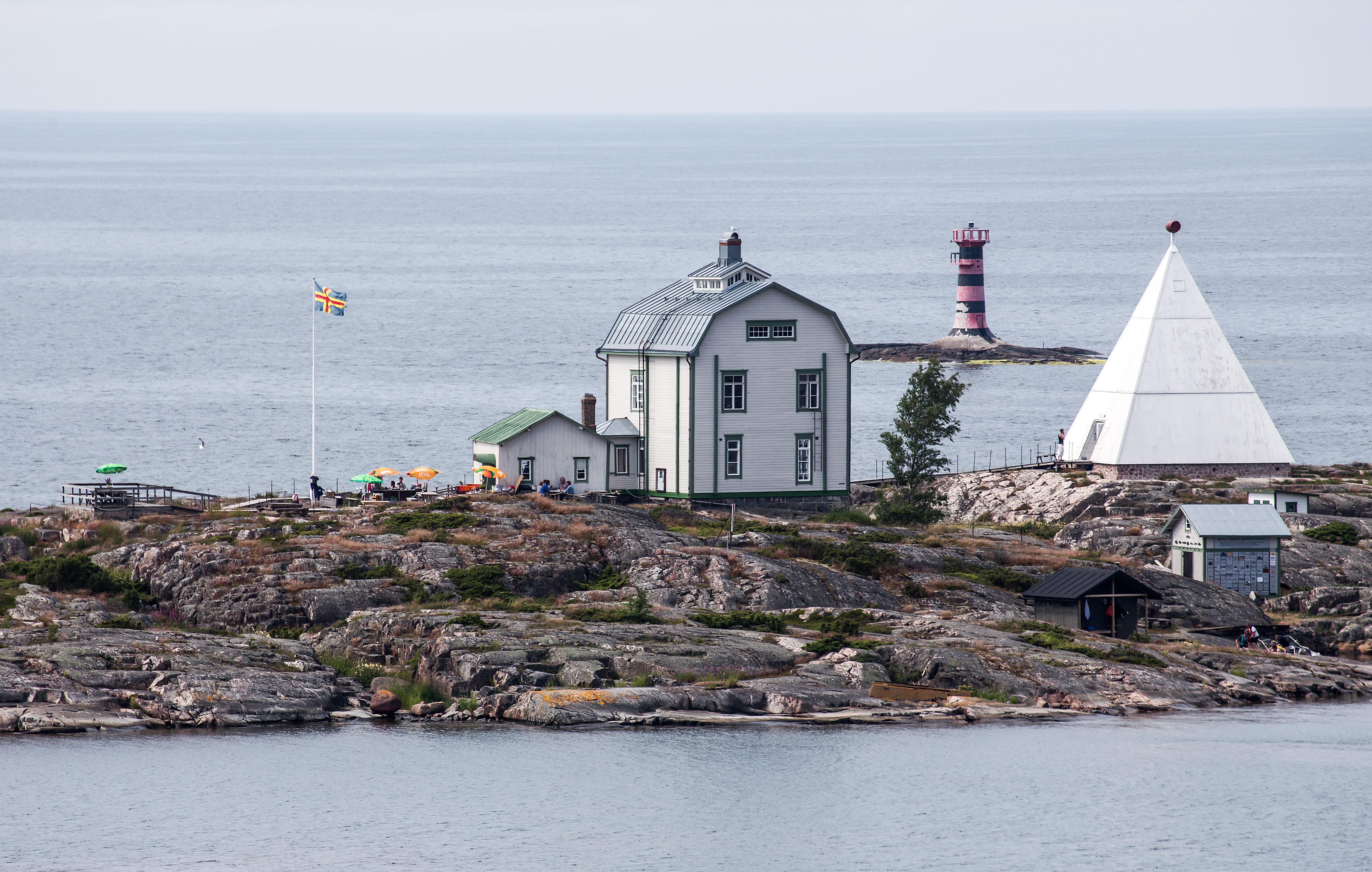 Kobba Klintar utanför Mariehamn